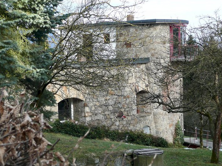 Turm 19 (Dorothea) der Maximilianischen Turmlinie